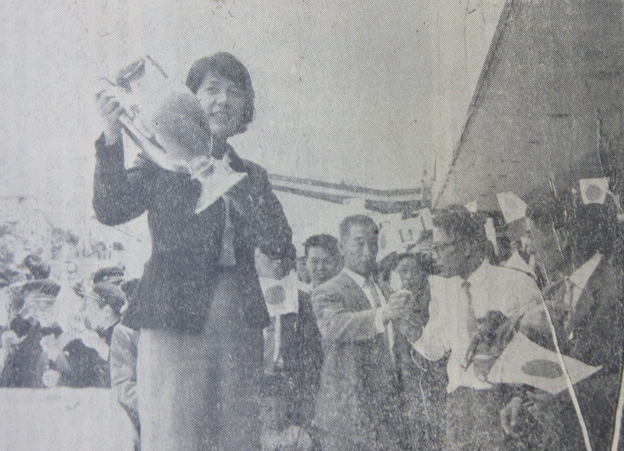 深津尚子は1965年4月の第28回世界卓球選手権大会女子シングルスで優勝した。同年5月22日、出生地の愛知県岡崎市にて撮影。